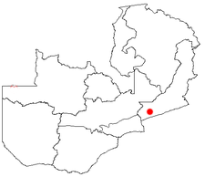 Lage von Nyimba in Sambia